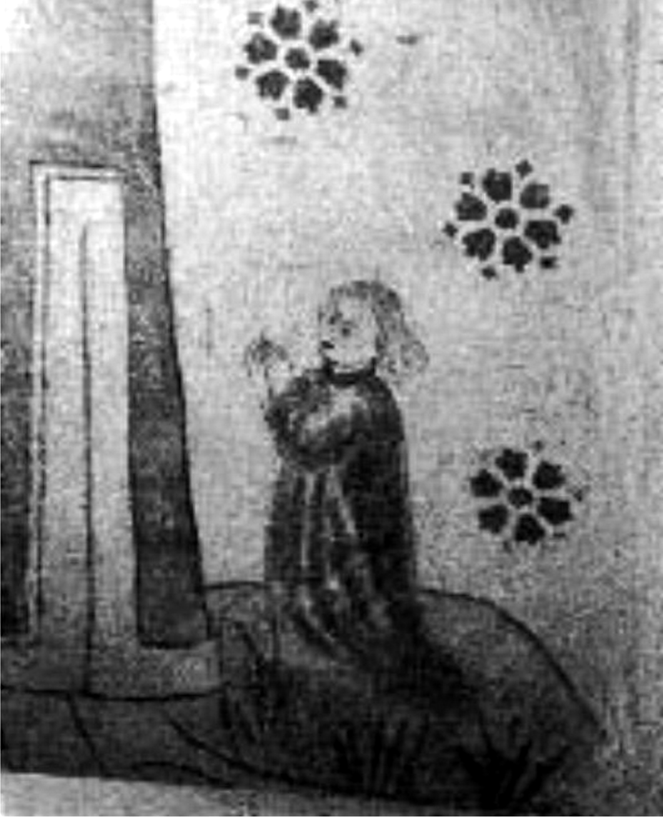 Lars Skalm